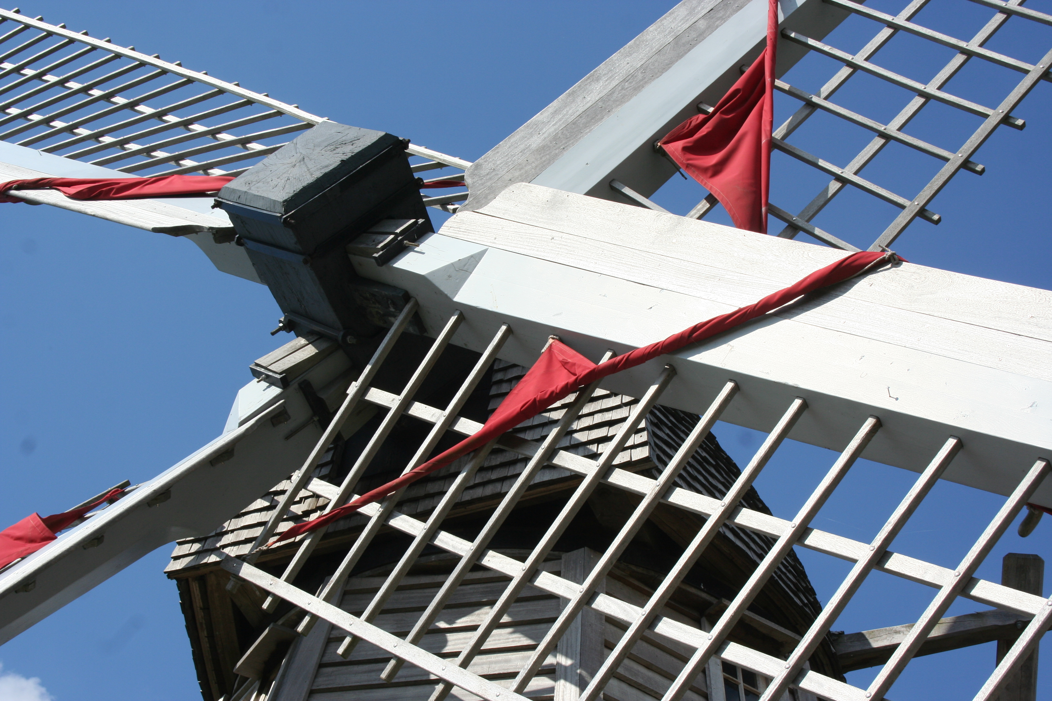 Tête en bois et ailes asymétriques (Moulin de l'Aile)